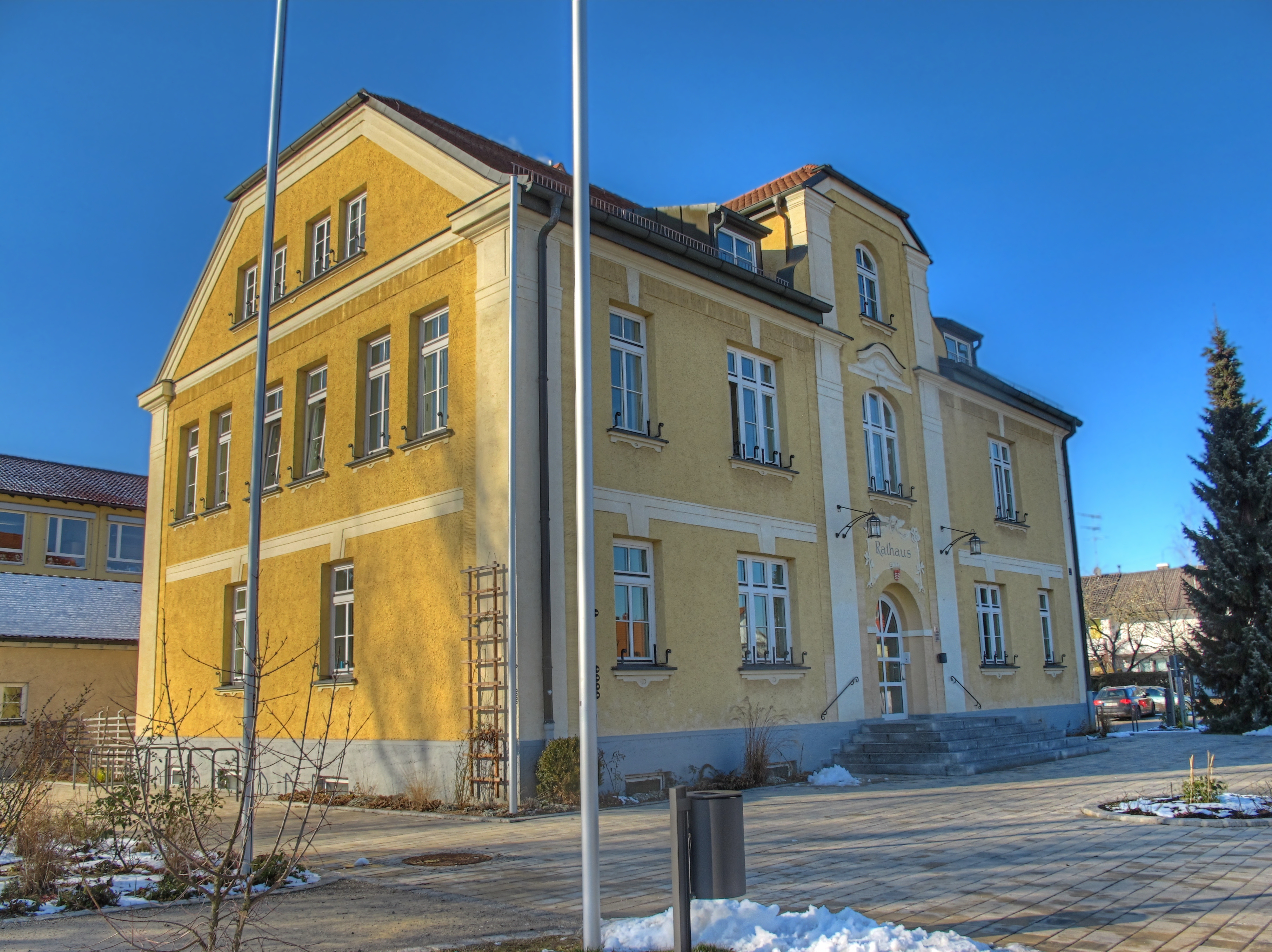 Deutschland, Bayern, Oberbayern, Landkreis Fürstenfeldbruck, Gemeinde Maisach, Rathaus, 2012